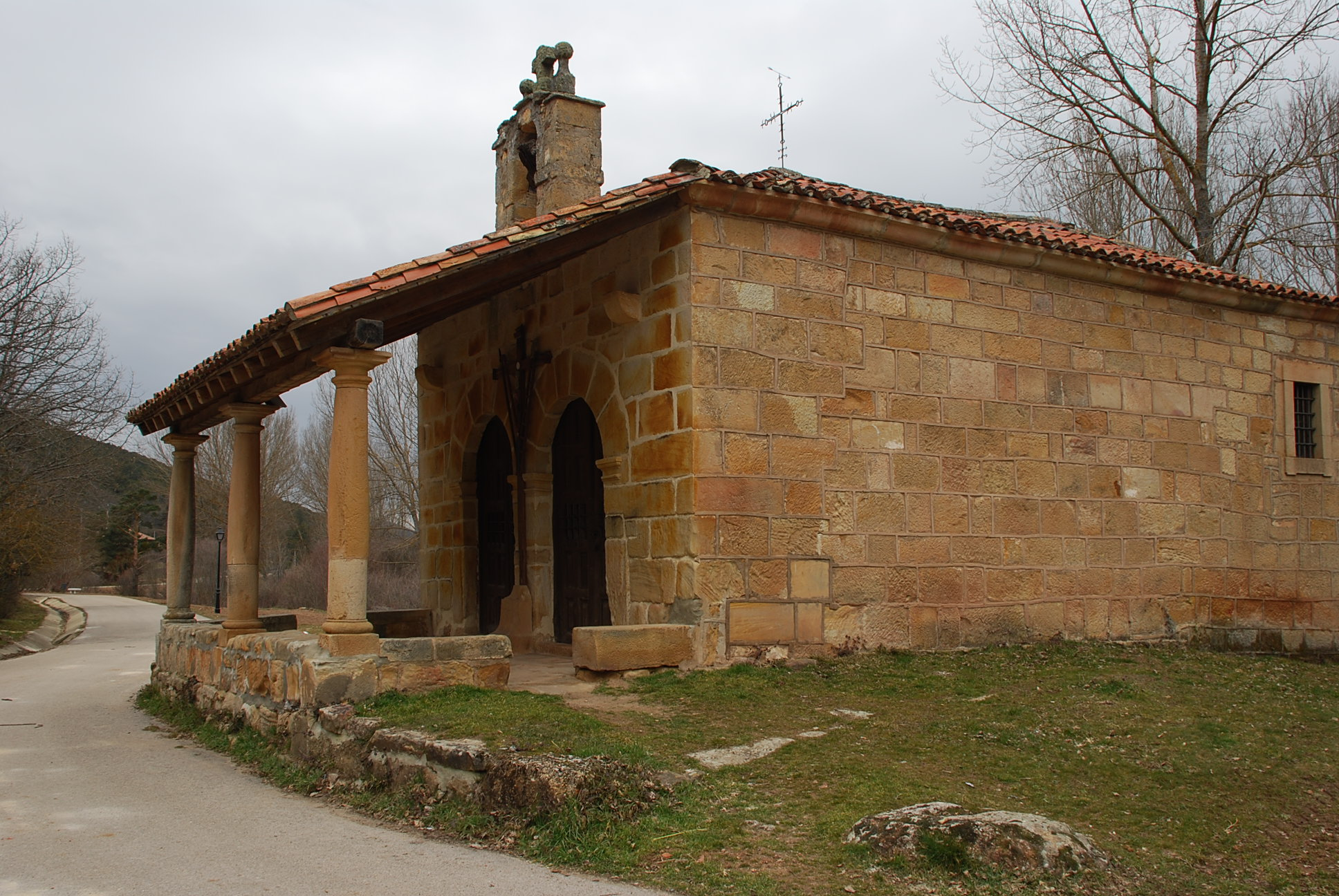 Ermita del Santo Cristo en Salduero (Soria).